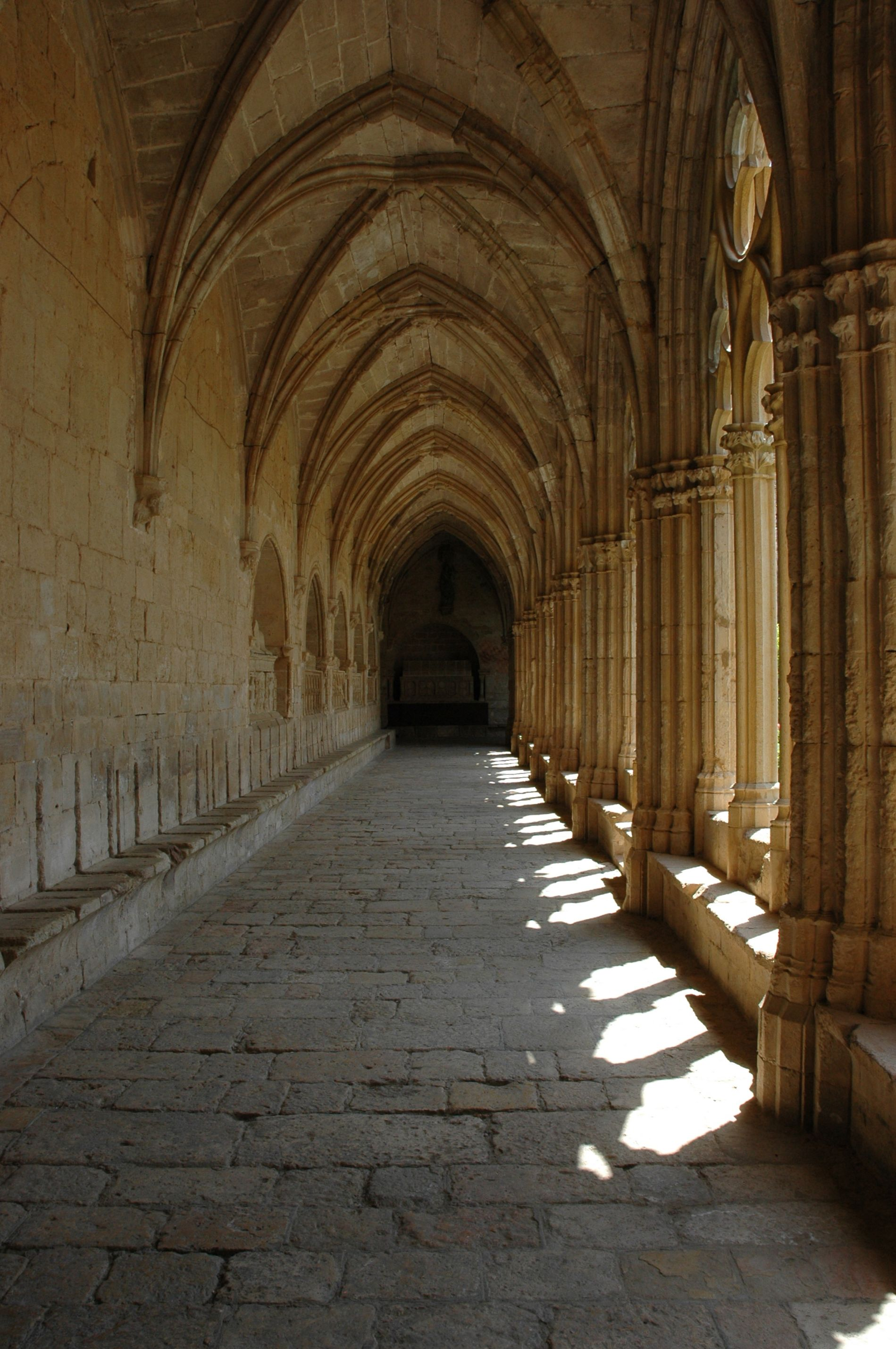 Monestir de Santes Creus - Claustre ala nord